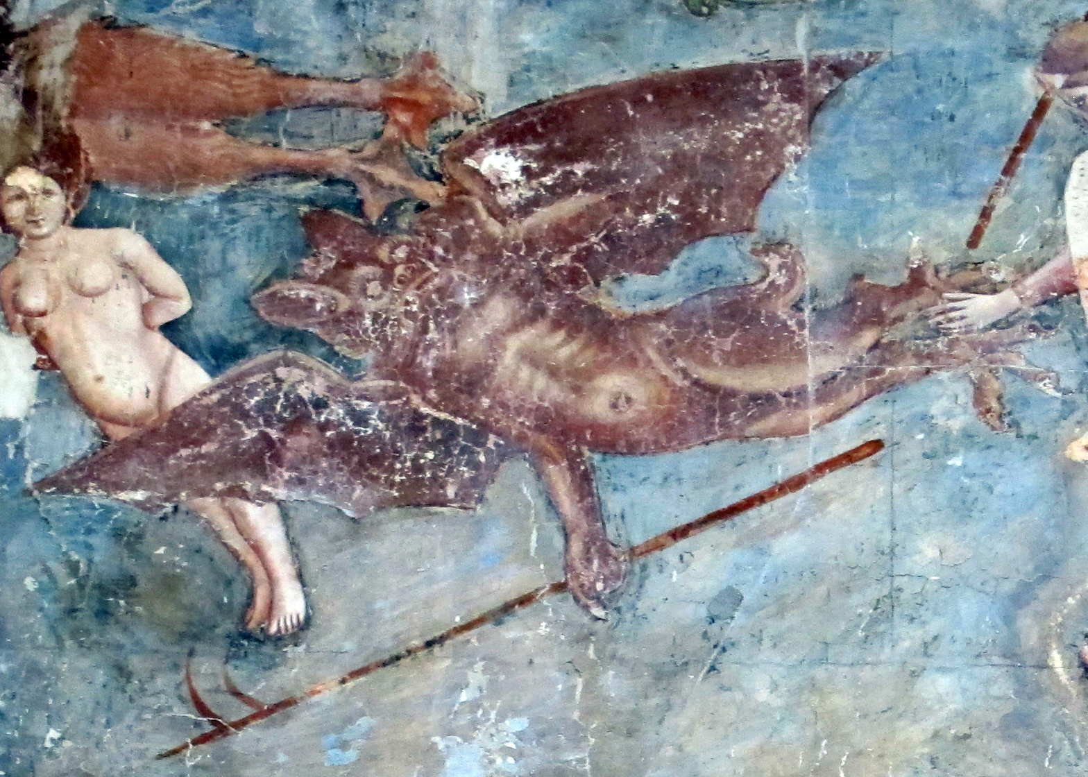 Buffalmacco, trionfo della morte, diavoli